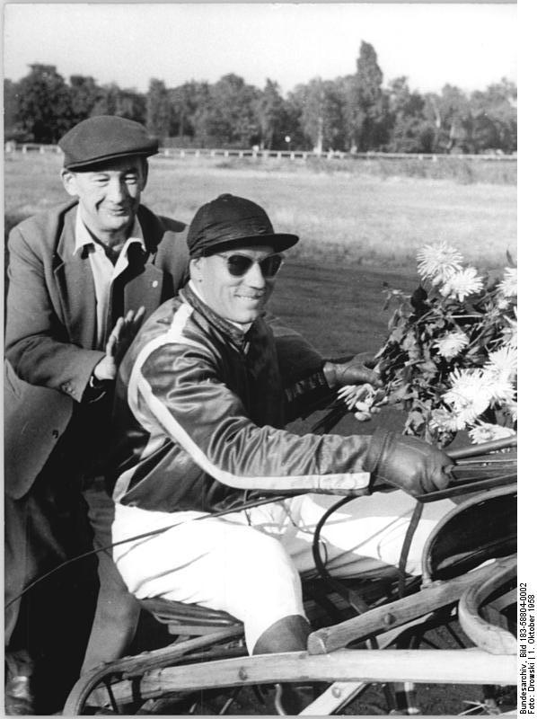 Gerhard Krüger Zentralbild Drowski 1.10.1958 Schafft Gerhard Krüger den Weltrekord? Der mehrfache gesamtdeutsche Champion Trabrennfahrer Gerhard Krüger fuhr am 1.10.1958 in Karlshorst seinen zweihundertsten diesjährigen Sieg mit der Traberstute Asta in einem Rennen über 2000 m-. Gerhard Krüger will in diesem Jahr dem Weltrekord von Hans Frömming aus der Vorkriegszeit mit 246 Siegen in einem Jahr das Lebenslicht ausblasen, nachdem er 1957 mit 207 Siegen in einem Jahr um einen Sieg besser war als Charlie Mills, der mit 206 Siegen zuvor an zweiter Stelle in der Weltbestenliste rangierte. UBz: Achim Barthel von der Rennleitung überreicht Gerhard Krüger einen Blumenstrauß.